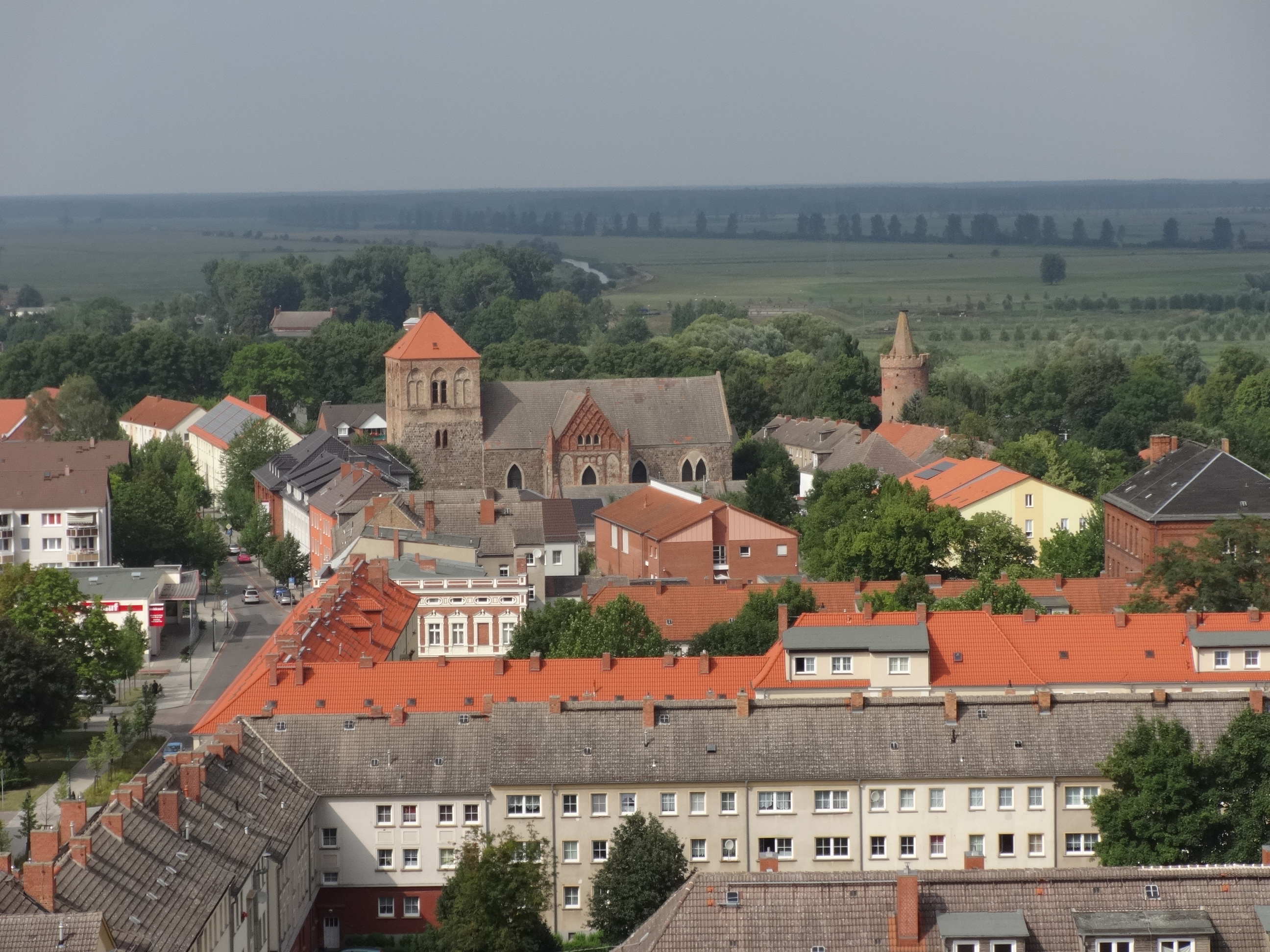 Nikolaikirche aus dem 12. Jahrhundert in Pasewalk. Sie gilt als die größte Feldsteinkirche Mecklenburg-Vorpommerns. Mehrfach zerstört und aufgebaut erhielt sie 1615 einen Renaissanceturm, der 1945 zerstört und abgetragen wurde.